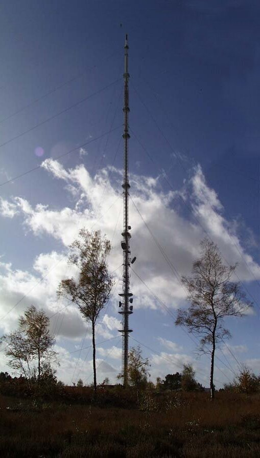 Pylône d'émission radio-tv de Mayet (Sarthe). C'est la 5ème plus haute construction de France